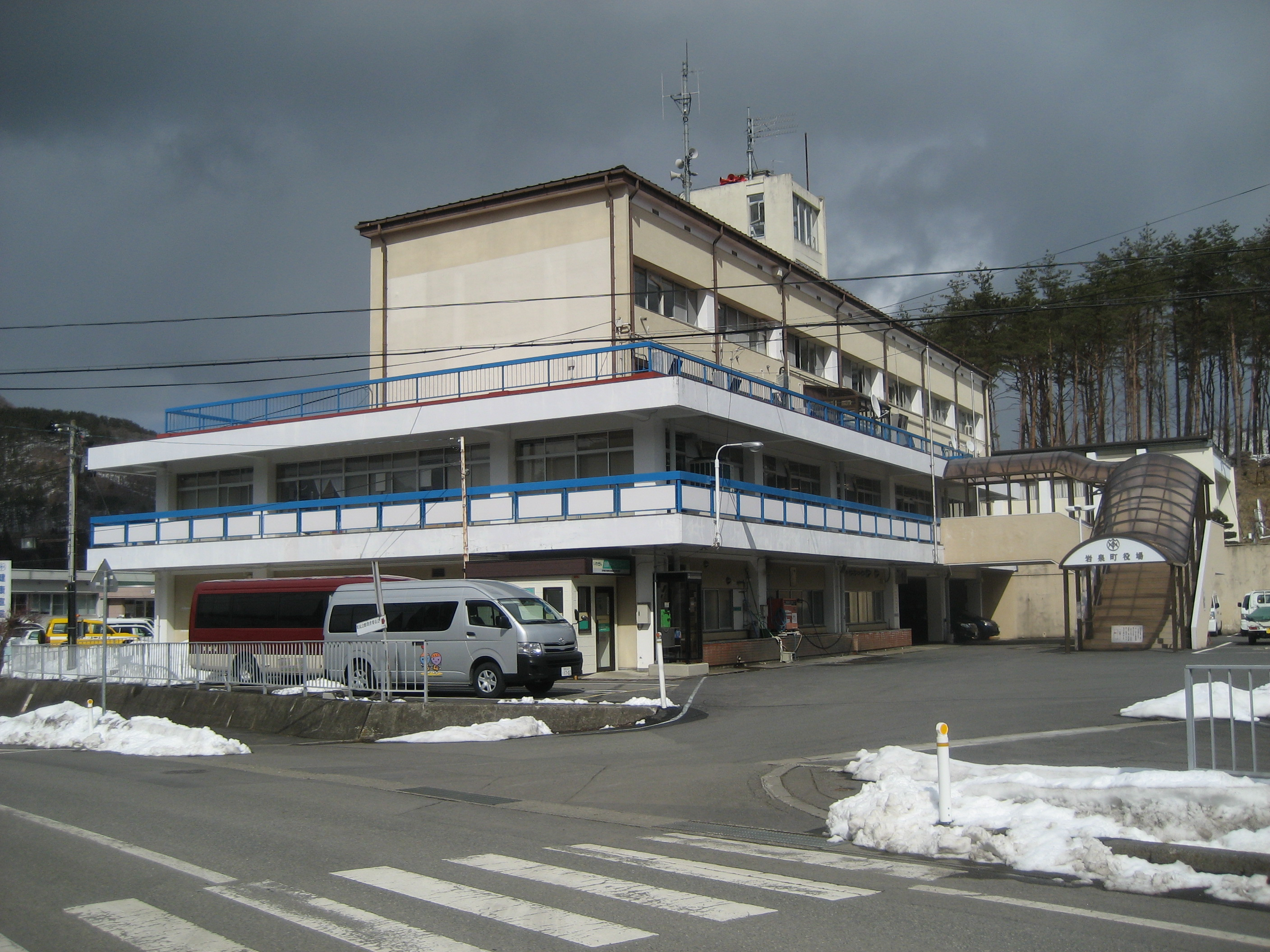 岩手県にある岩泉町役場庁舎